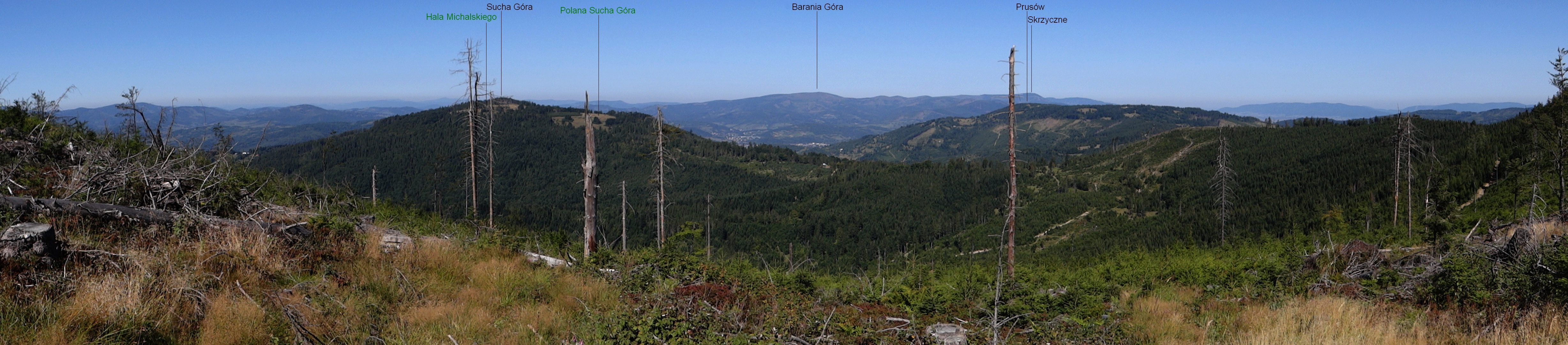 Hala Redykalna, panorama